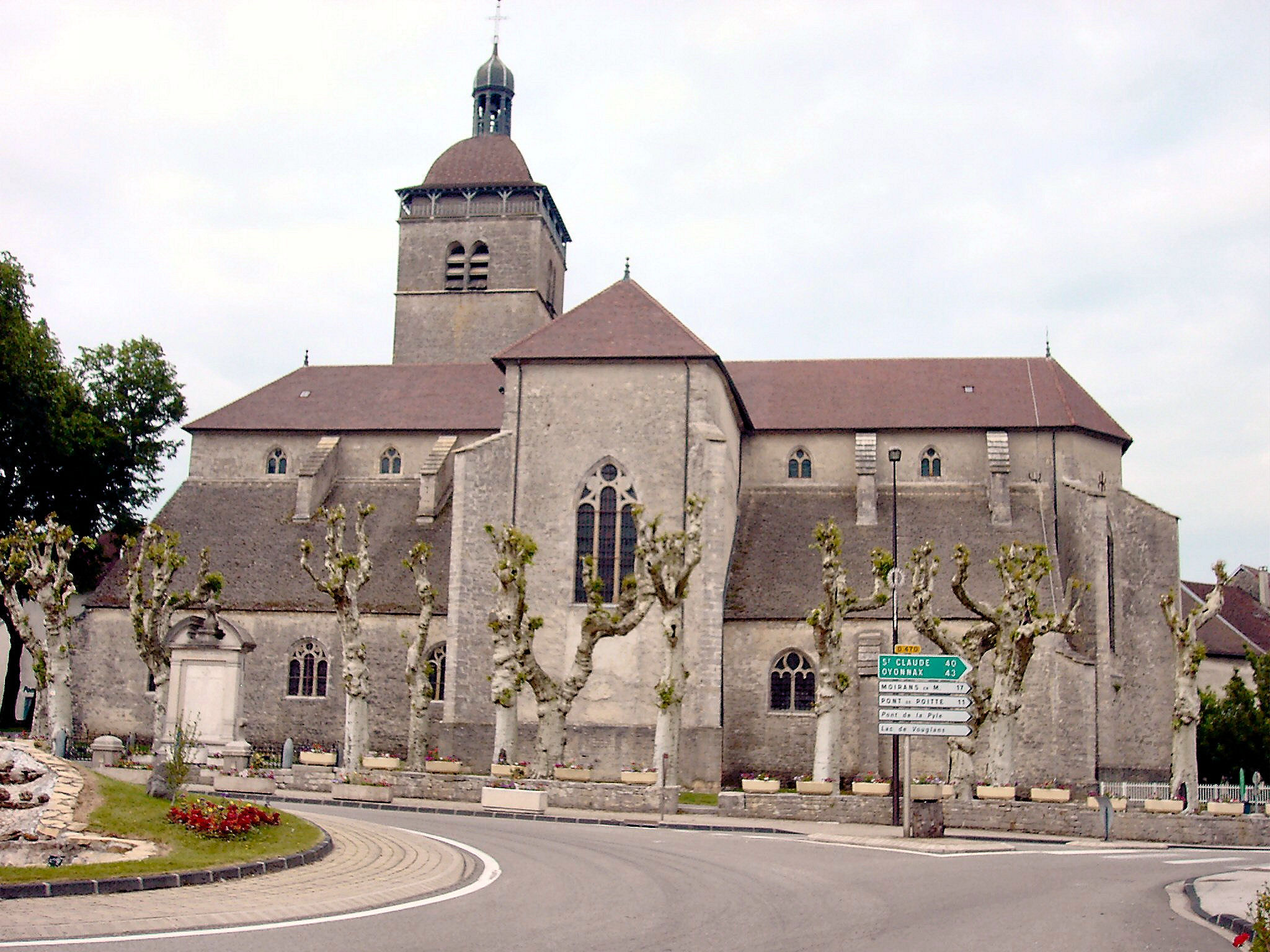 Orgelet Eglise